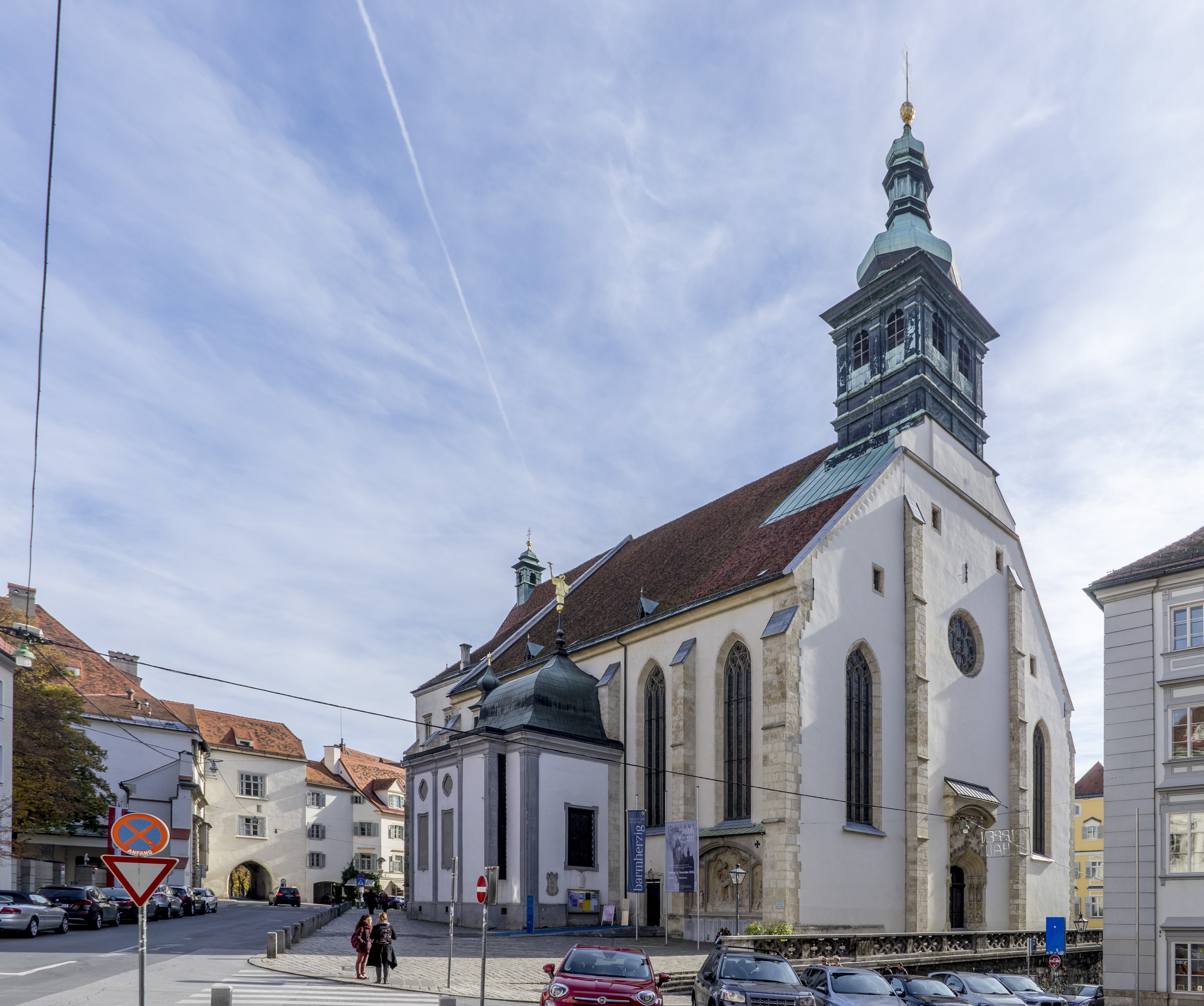 Grazer Dom Nordwest